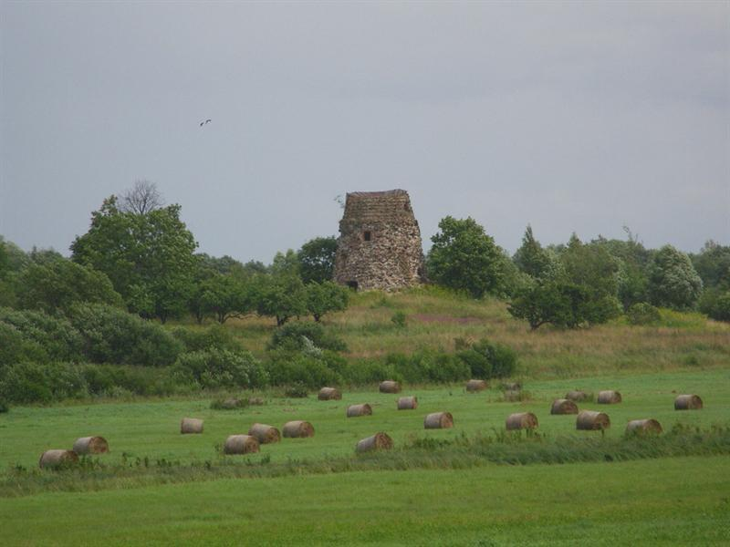 Vaduvų dvaro vėjo malūnas